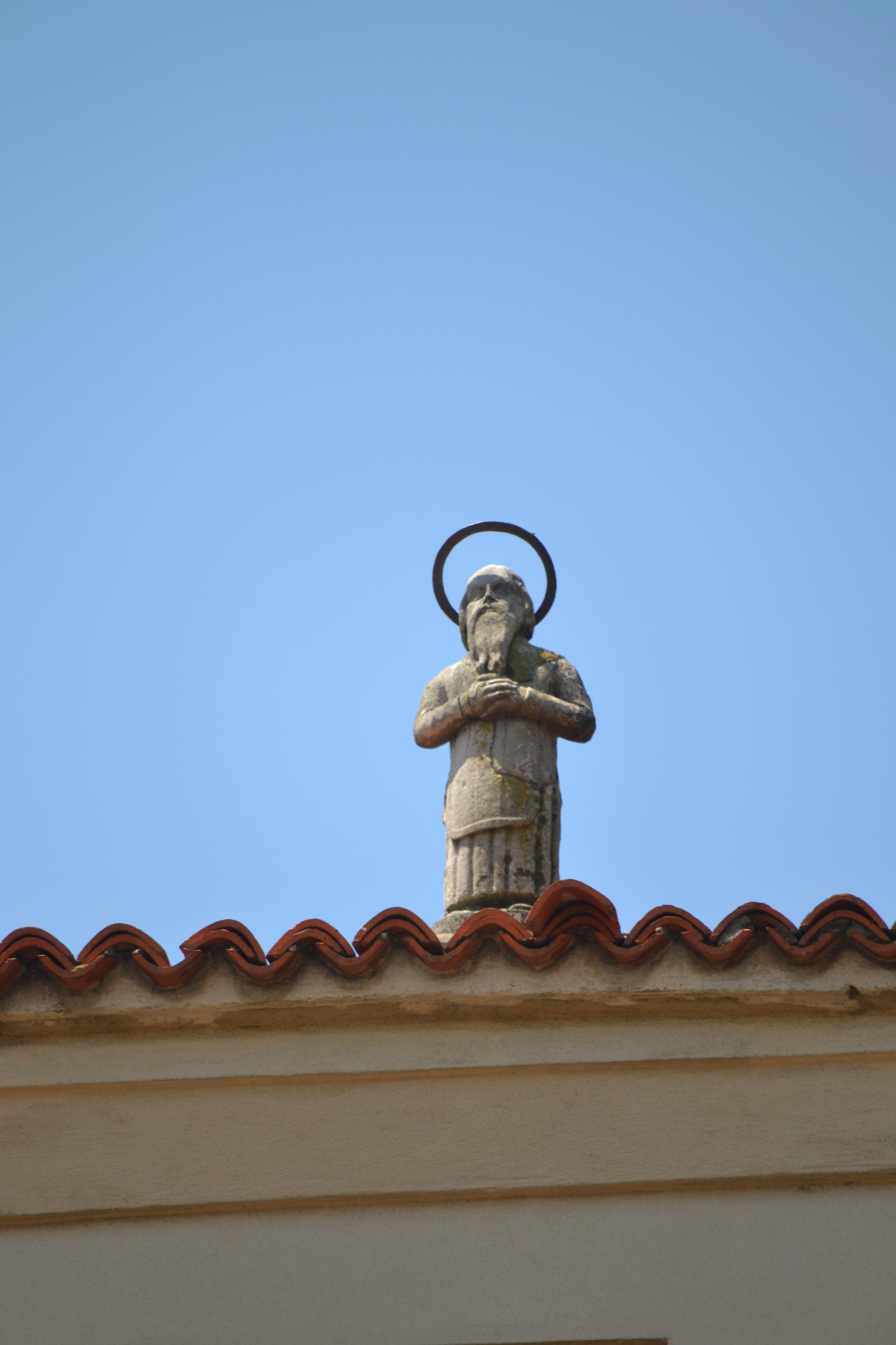 Tetto della chiesetta di Madonna in Veroncora